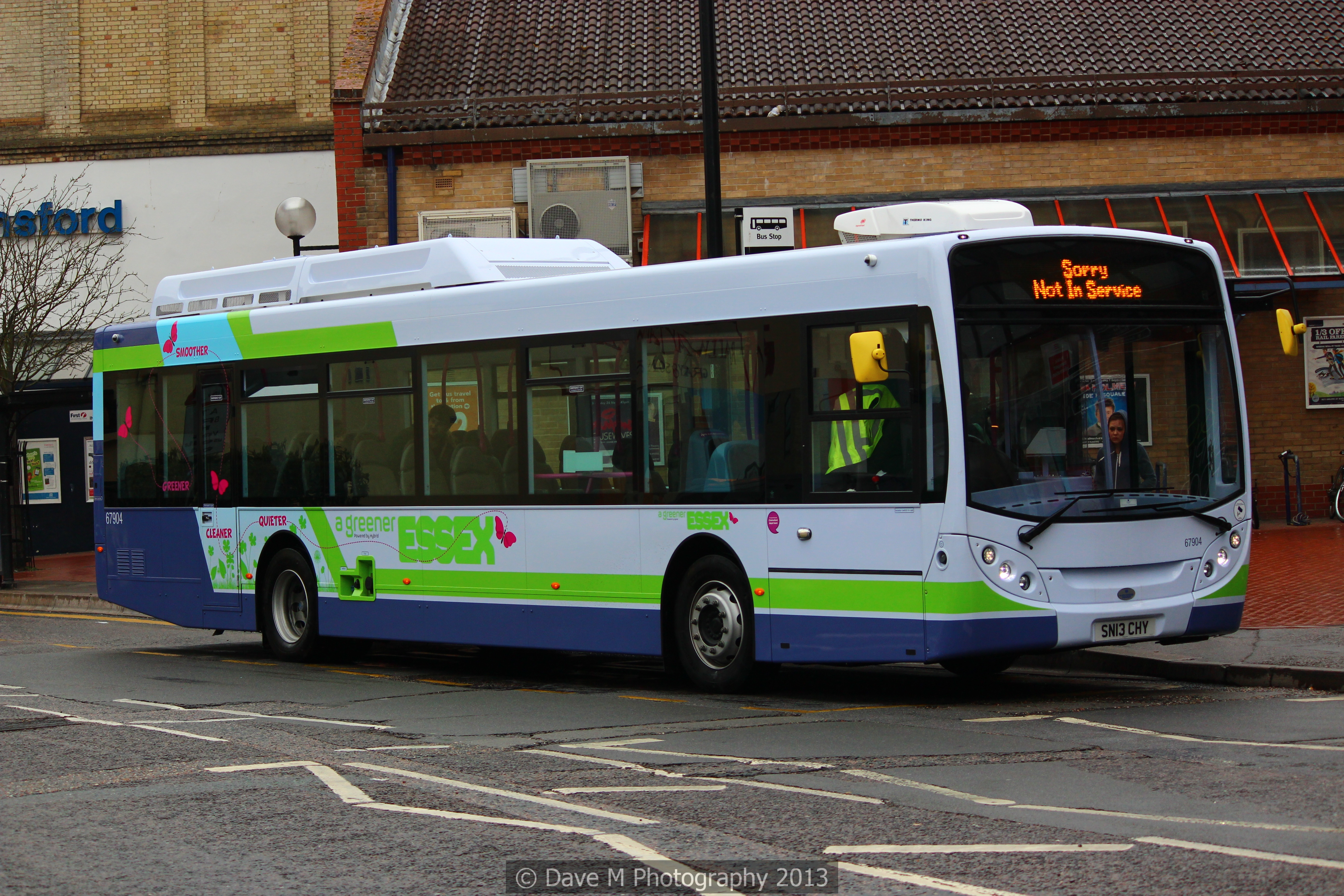 First Essex - 67904 - SN12 CHY